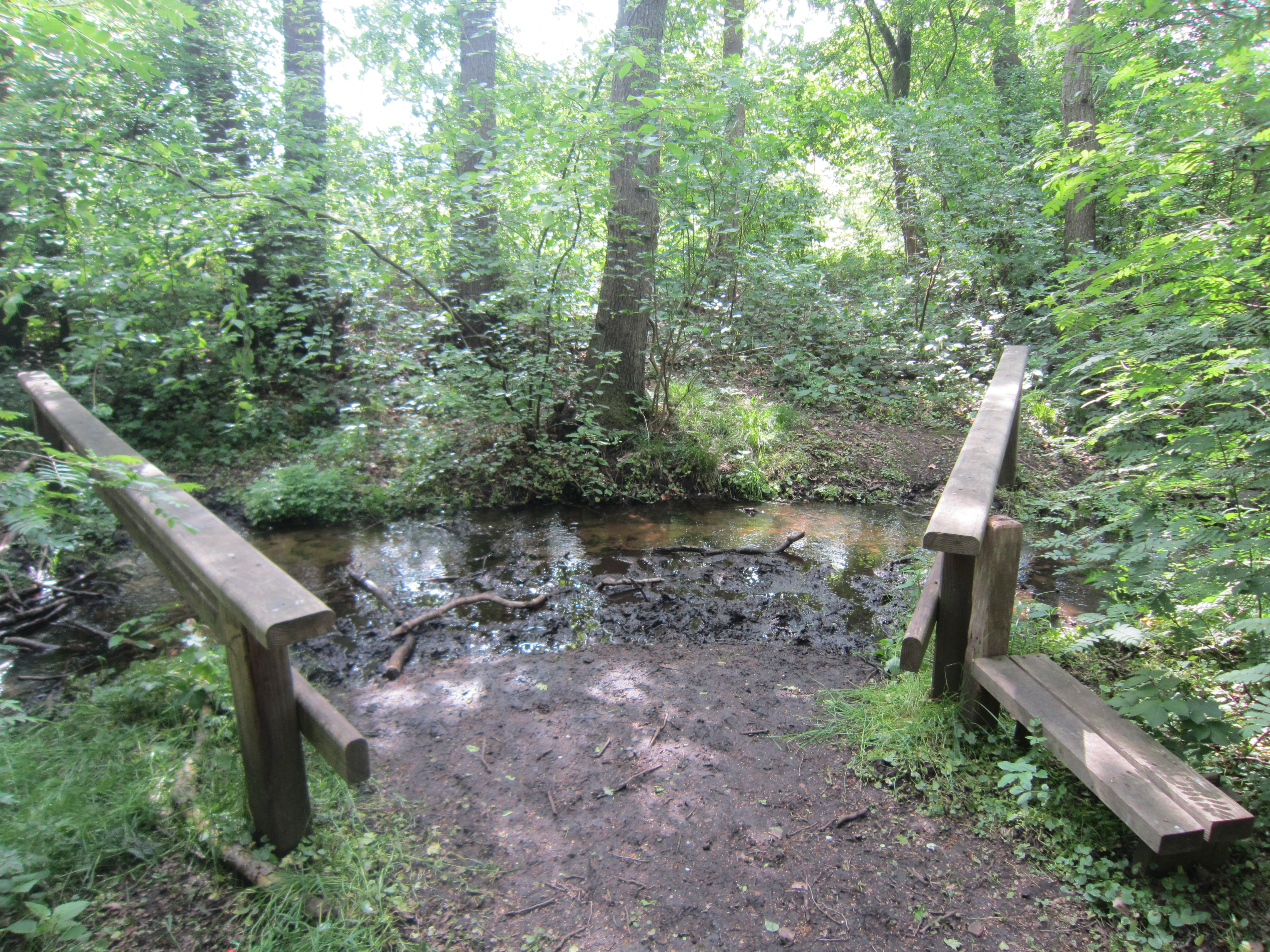 Neben dem Naturlehrpfad am Handorfer Mühlenbach in Holdorf (Landkreis Vechta in Niedersachsen) wird eine Gelegenheit zum Wassertreten im Bach geboten.